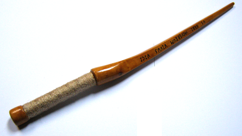 Magická hůlka / Magic wand.